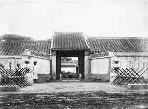 北京王府井莫理循家的大门